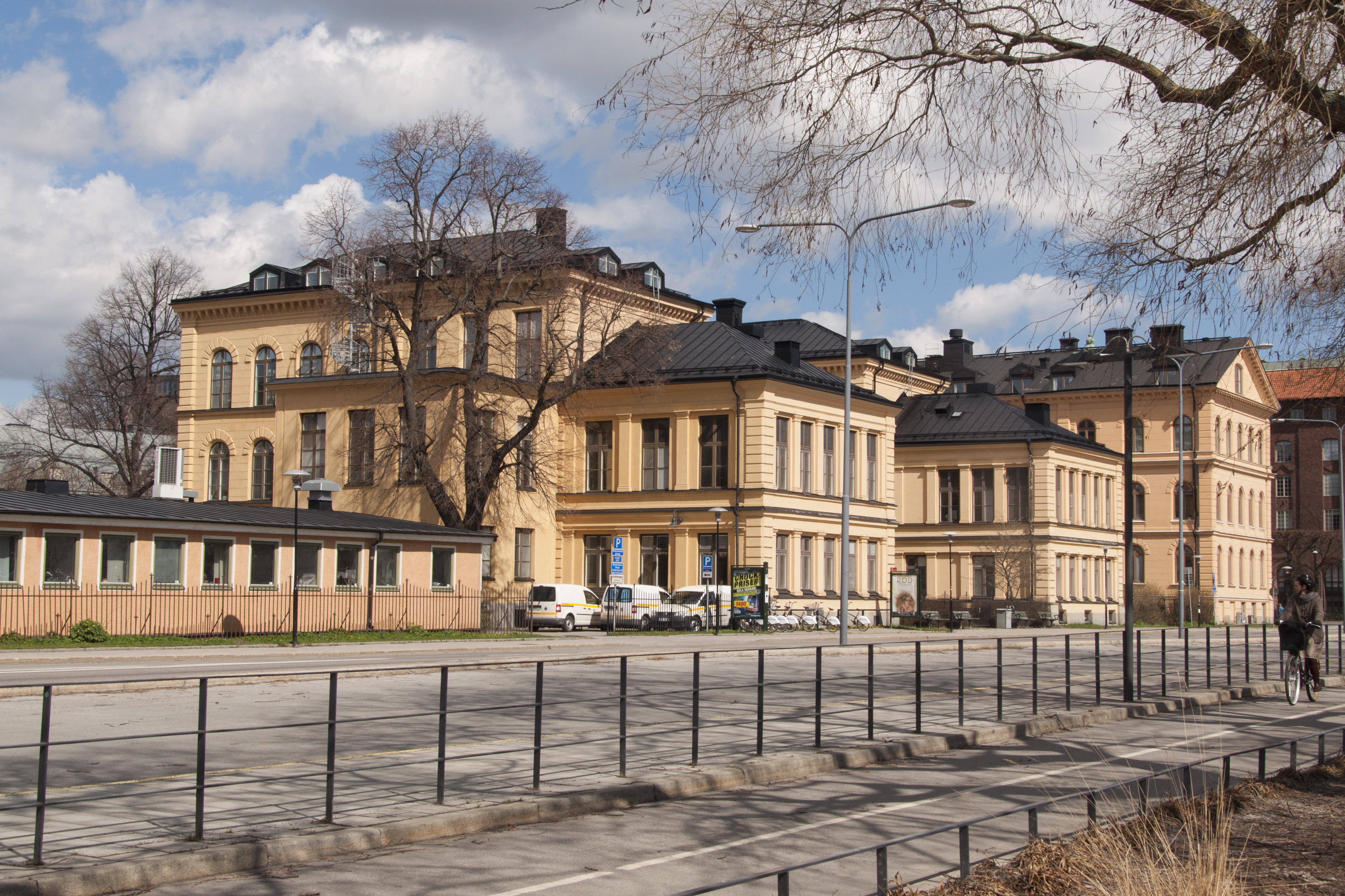 Gamla Karolinska Institutet på Kungsholmen. Byggnadsår 1866, arkitekt J E Söderlund, byggherre Medico-Kirurgiska Institutet, byggmästare H & H Hallström. 1894 förlängning av flyglarna i två våningar, påbyggnad med en vån på ursprungliga flyglarna samt envånig överbyggnad mellan flyglarna för kapell.